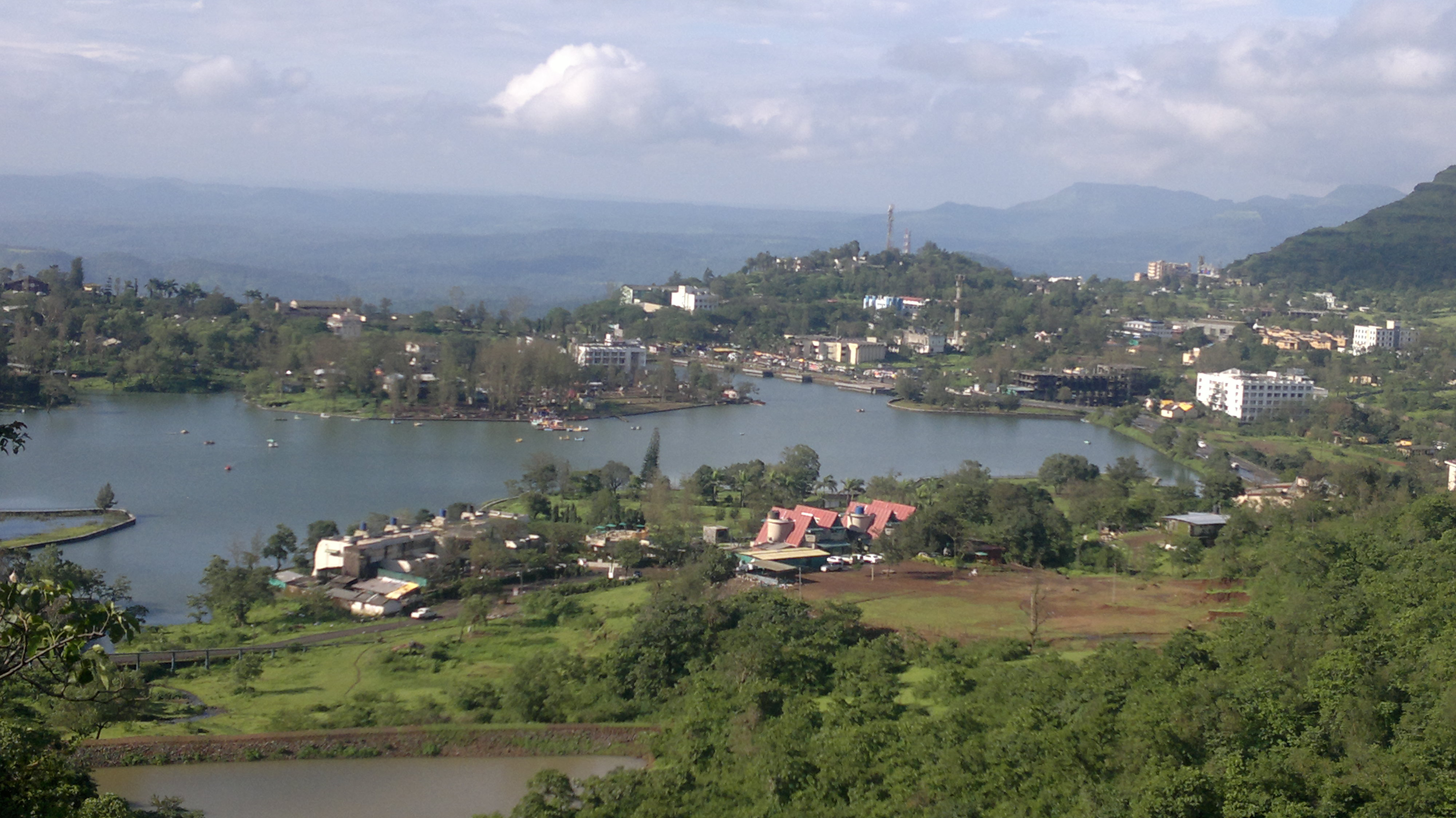 Saputara, Gujarat, India